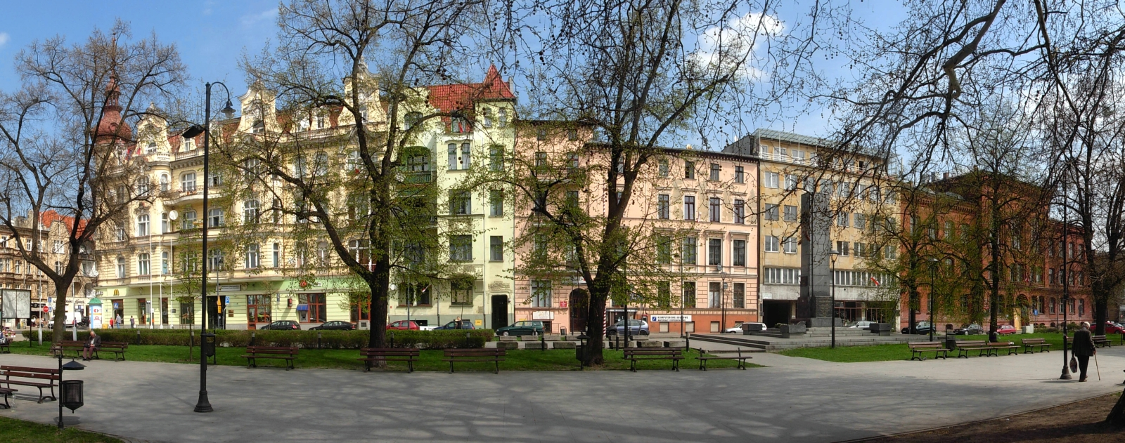 Plac Wolności w Bydgoszczy